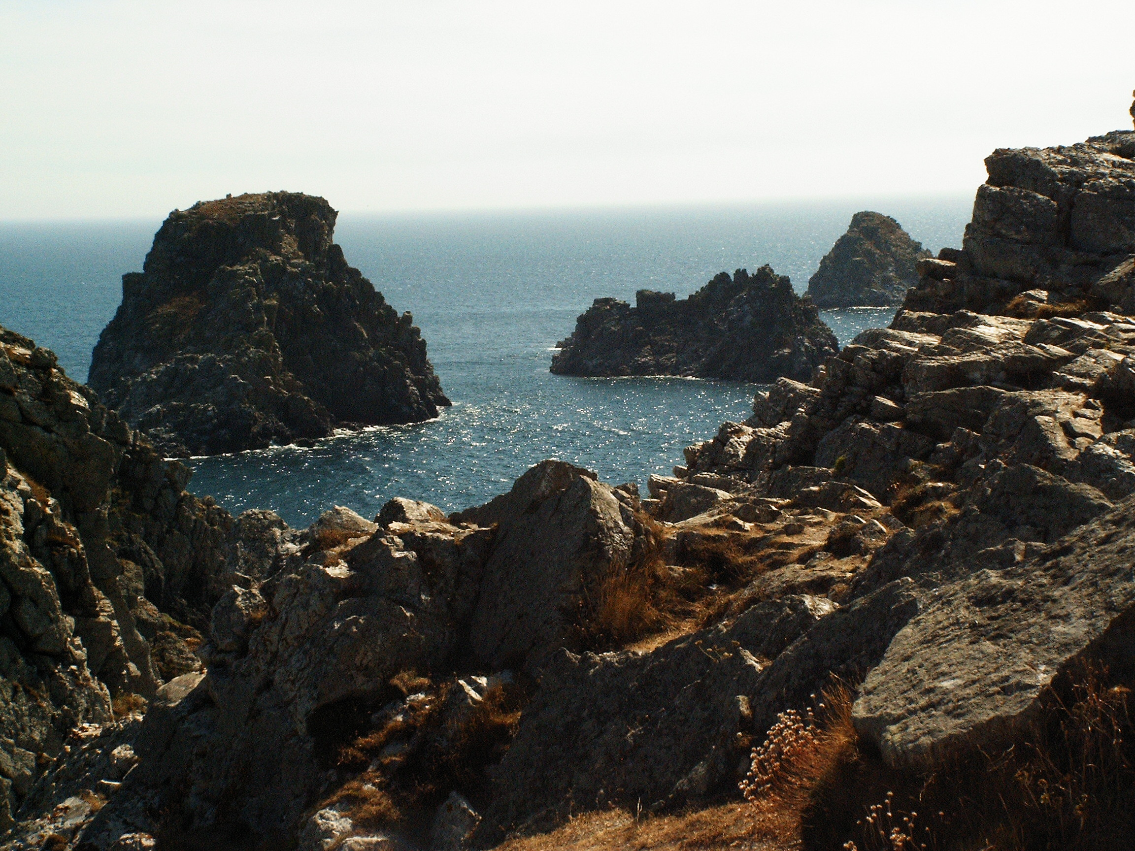 Pointe de Penhir (Halbinsel Crozon) in der Bretagne